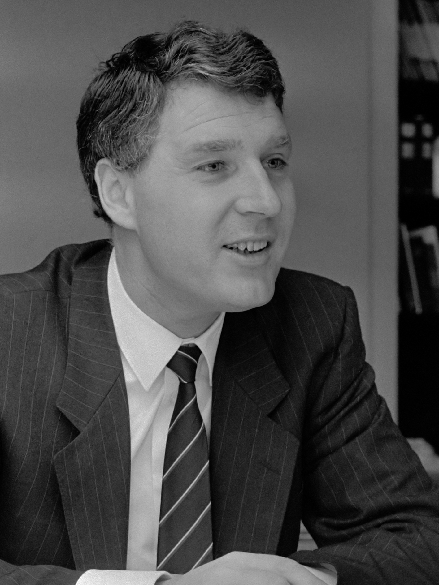 Opdracht Financieel Dagblad , de heer Jongbloed (directeur staal bankiers), close 7 februari 1985